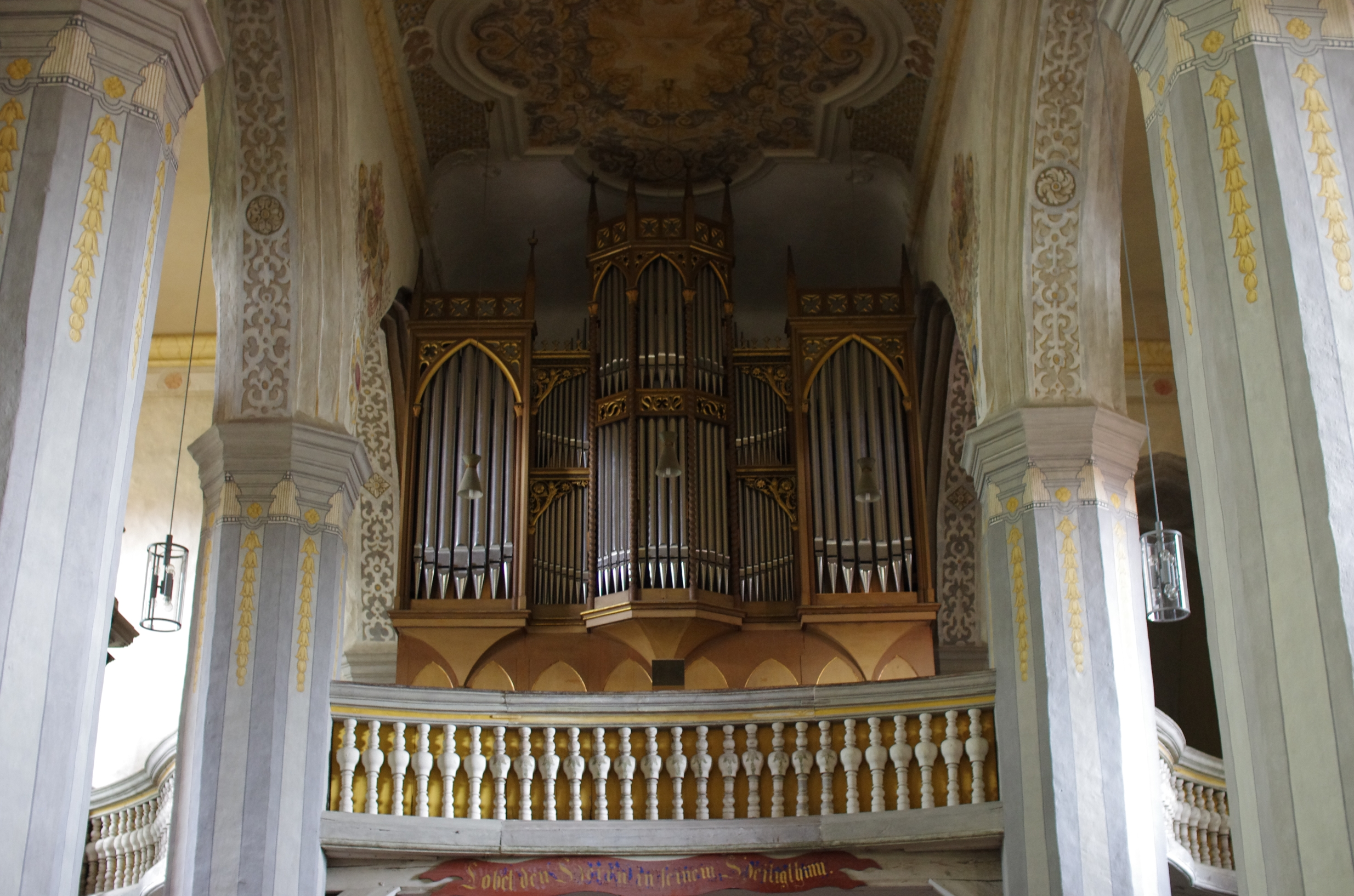 Bad Schmiedeberg in Sachsen-Anhalt. Die Nikolaikirche steht unter Denkmalschutz. Die Orgel der Kirche